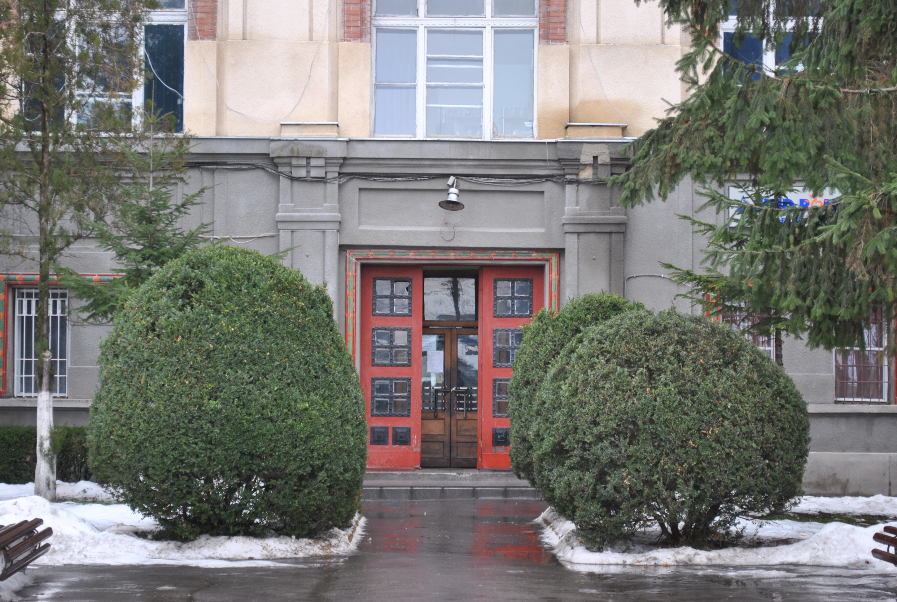 Fosta școală superioară de administrație, azi Palatul Sindicatelor, 1902 - 1913